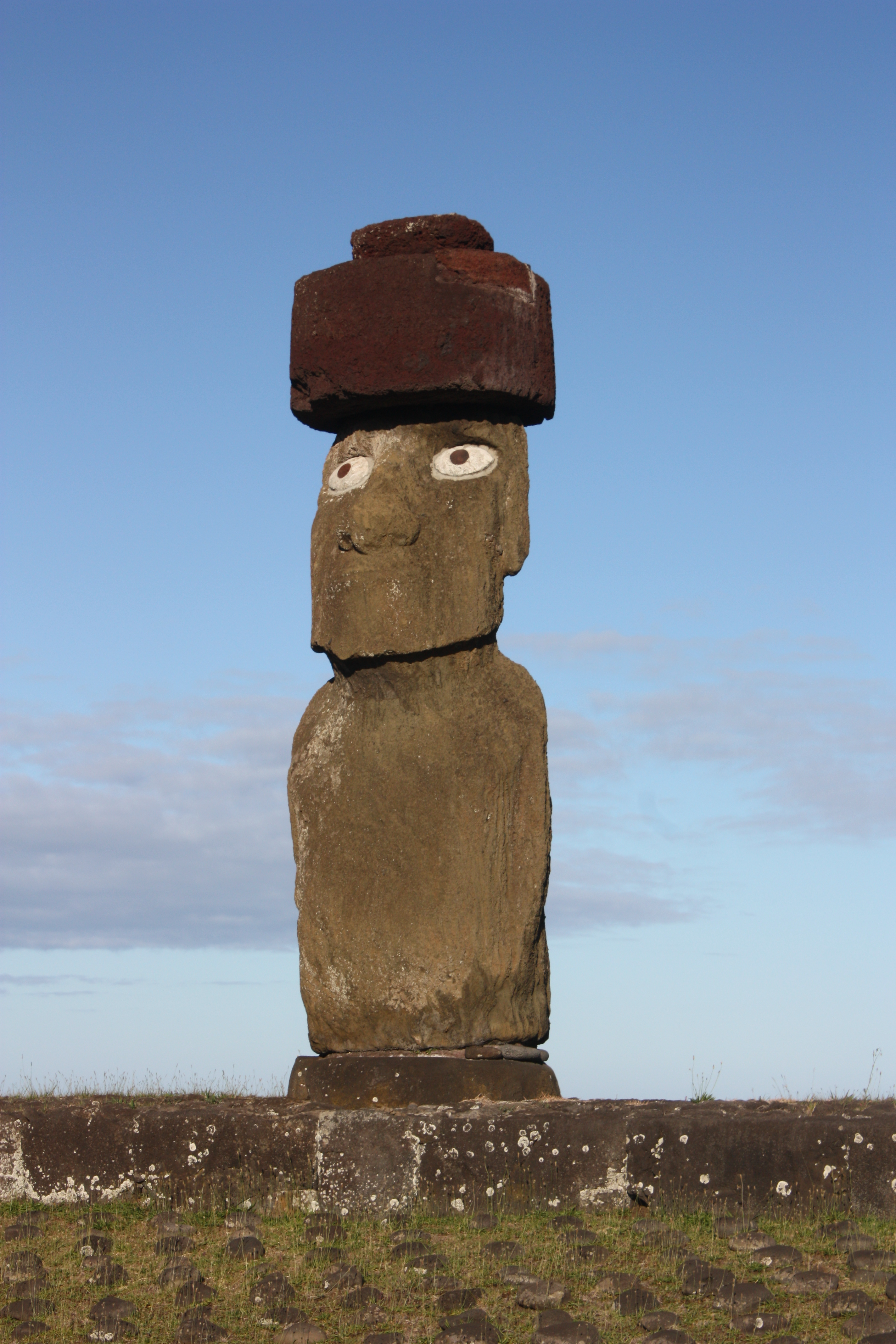 Easter Island, Hanga Roa, Ahu Ko Te Riku